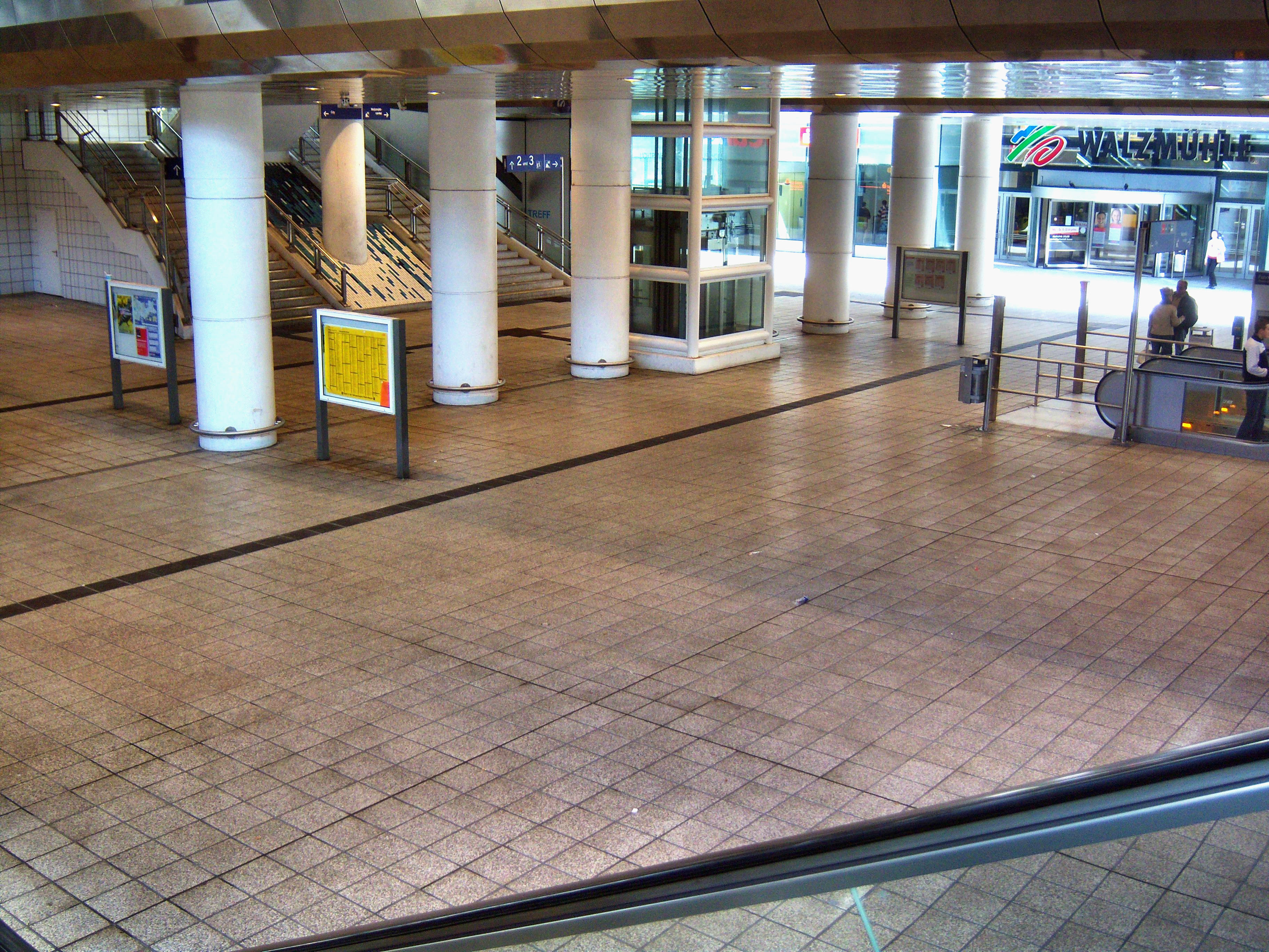 Neue Unterführung des Bahnhofes Ludwigshafen (Rhein) Mitte